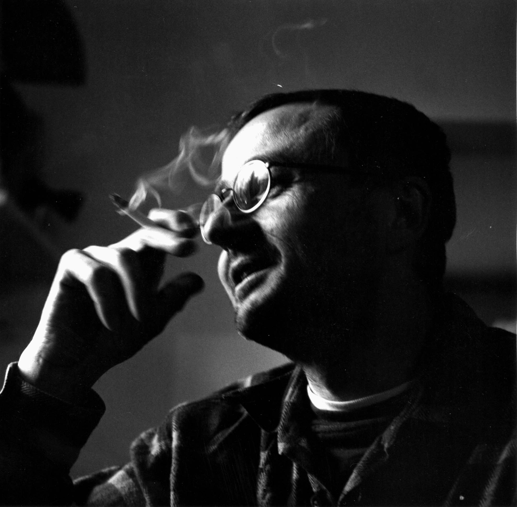 Tobias Weichberger - Worpsweder Künstler